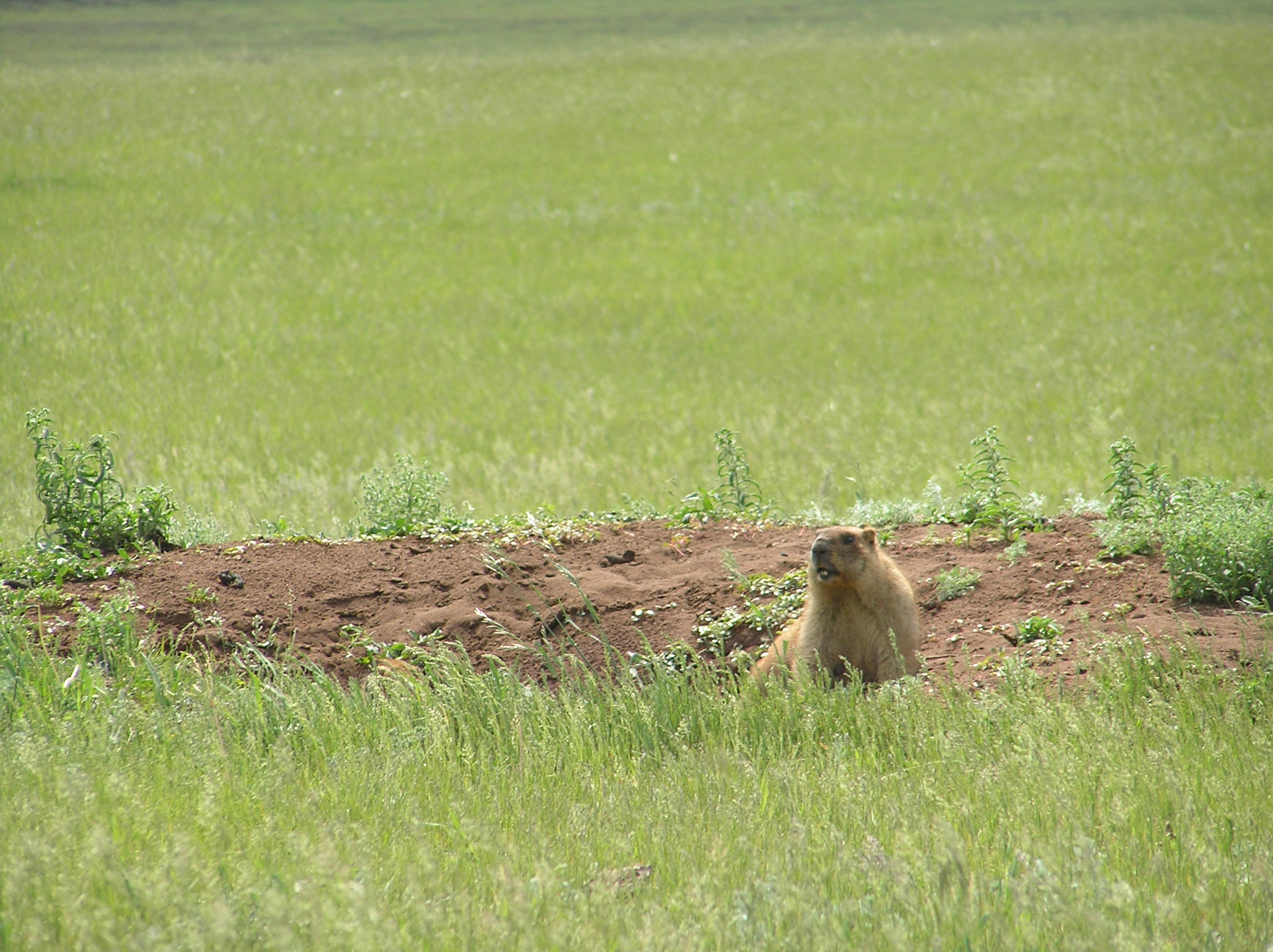 Чатыр-Тау заказник, Азнакаевский район This image is related to the protected area of Russia number 1610010